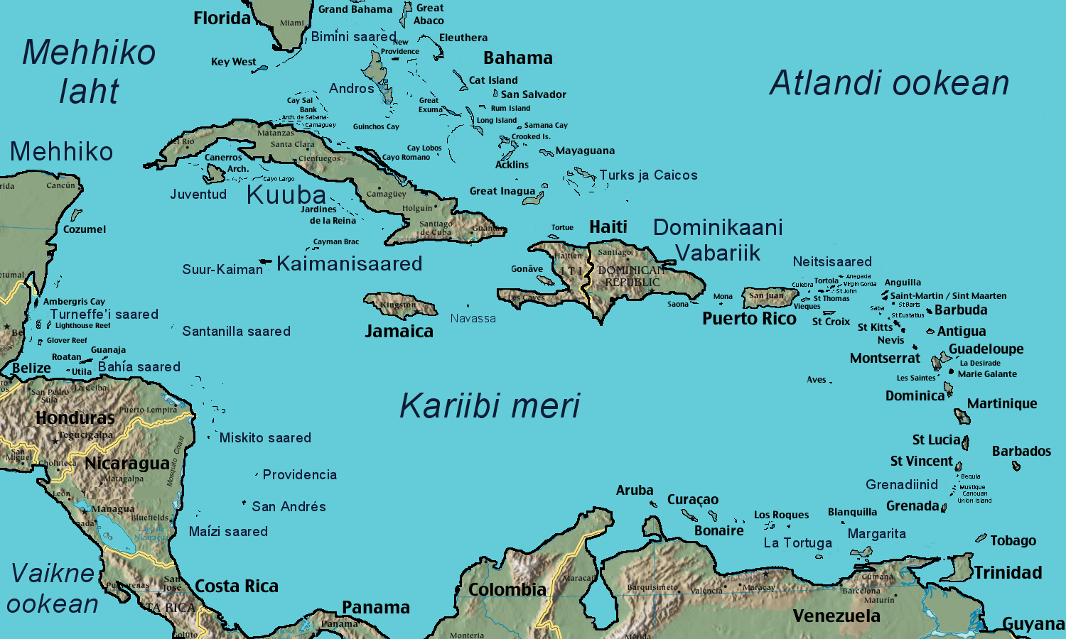 Antillide kaart